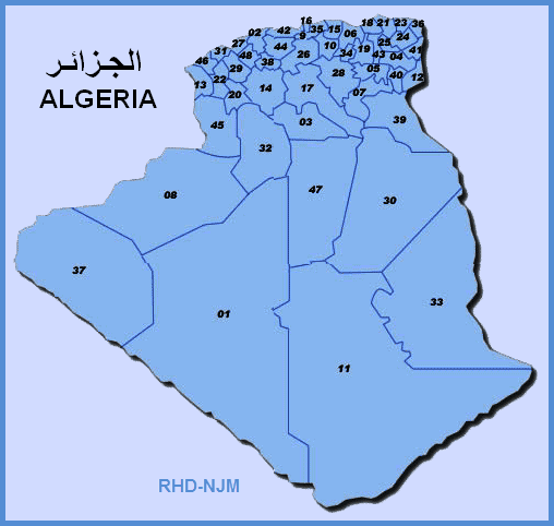 Carte des départements algérienne